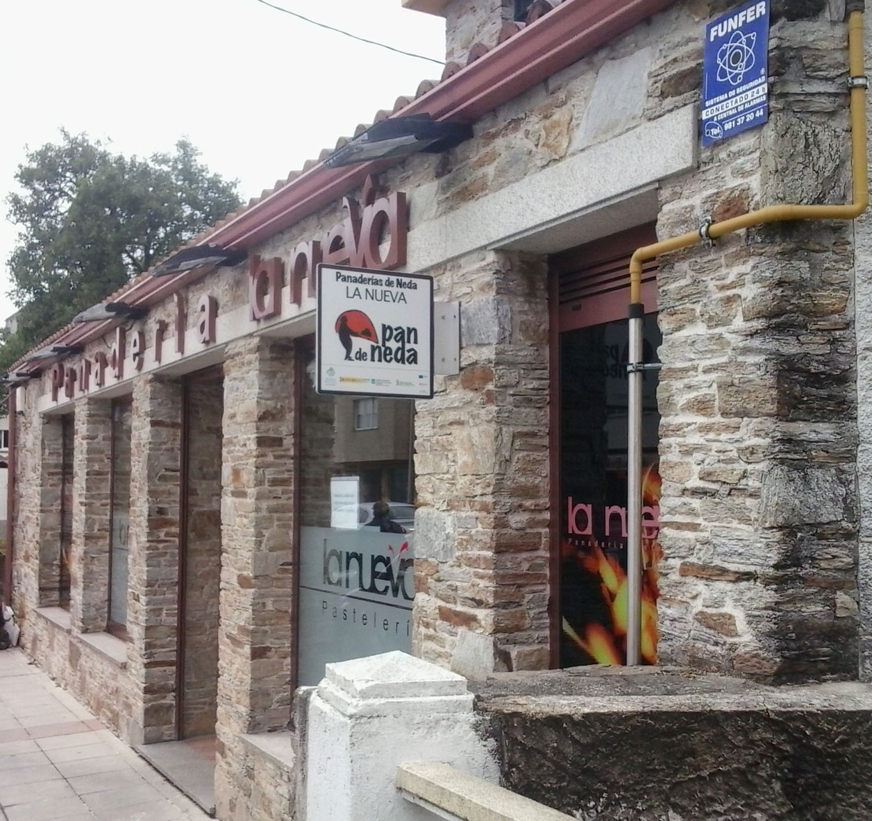 Imaxe dunha panadería de Neda Xuvia A Coruña Galiza Spain